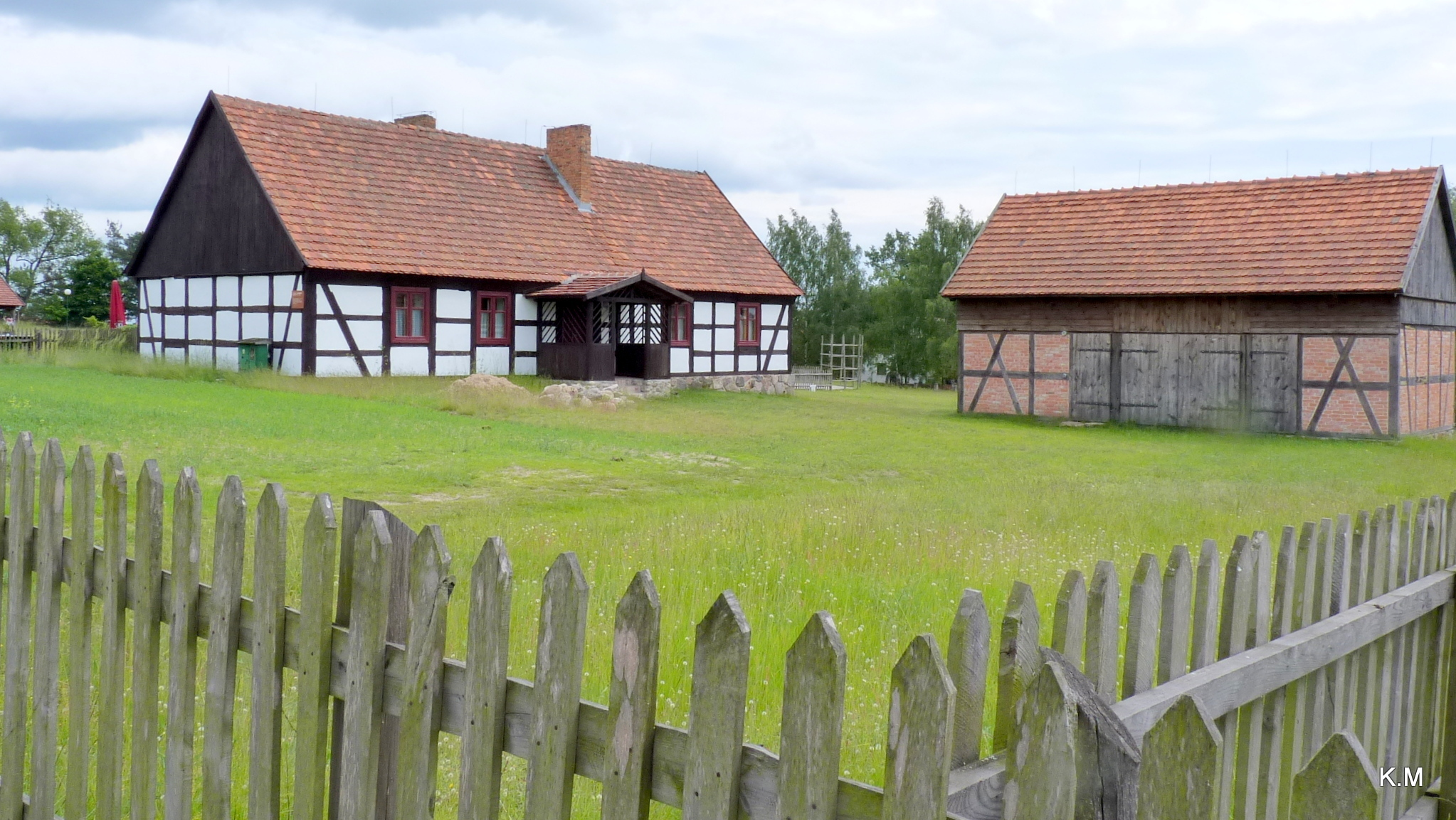 Etnograficzny skansen w Osieku nad Notecią .